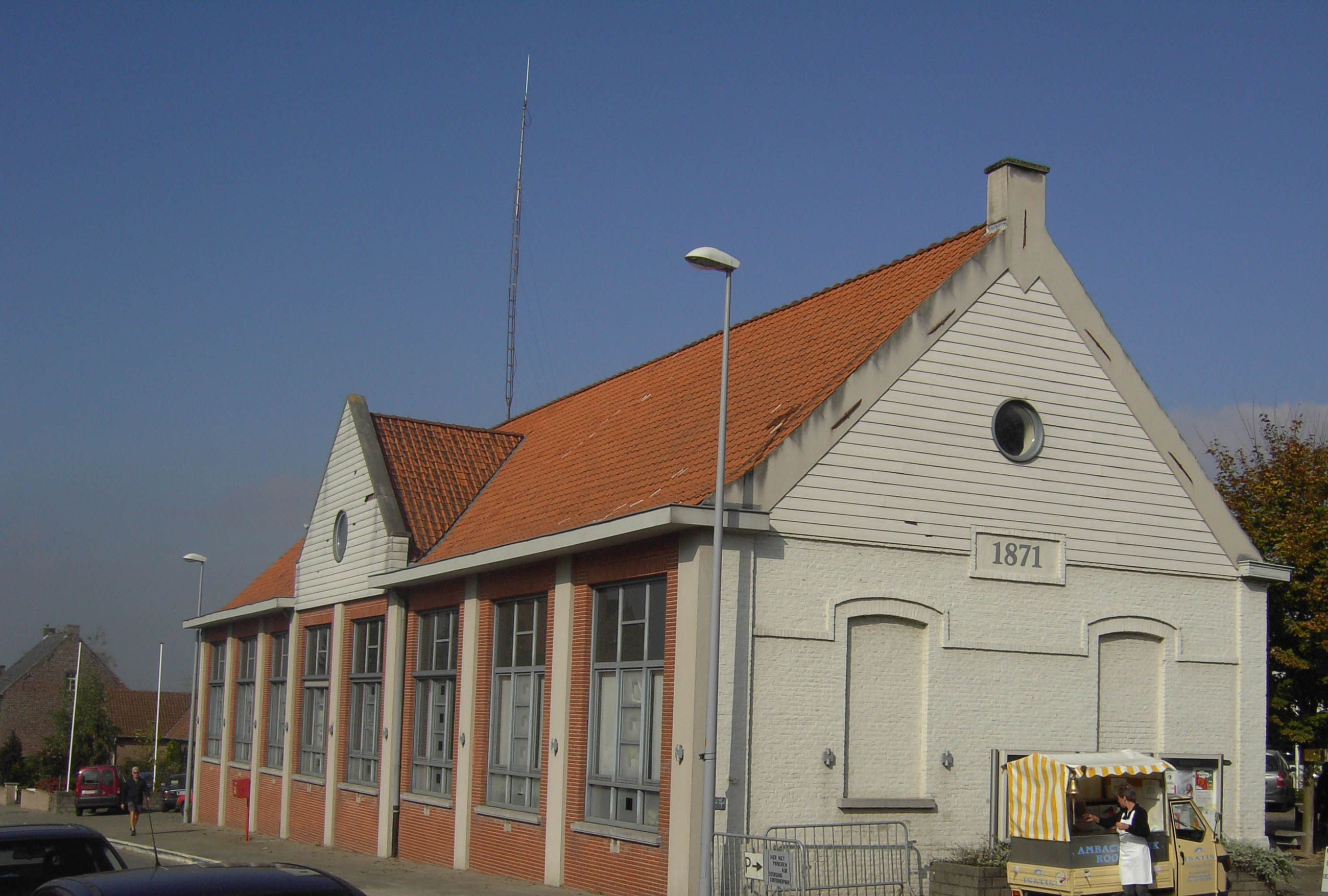 Gemeentehuis Wortegem-Petegem - Waregemseweg - Wortegem - Wortegem-Petegem - Oost-Vlaanderen - België